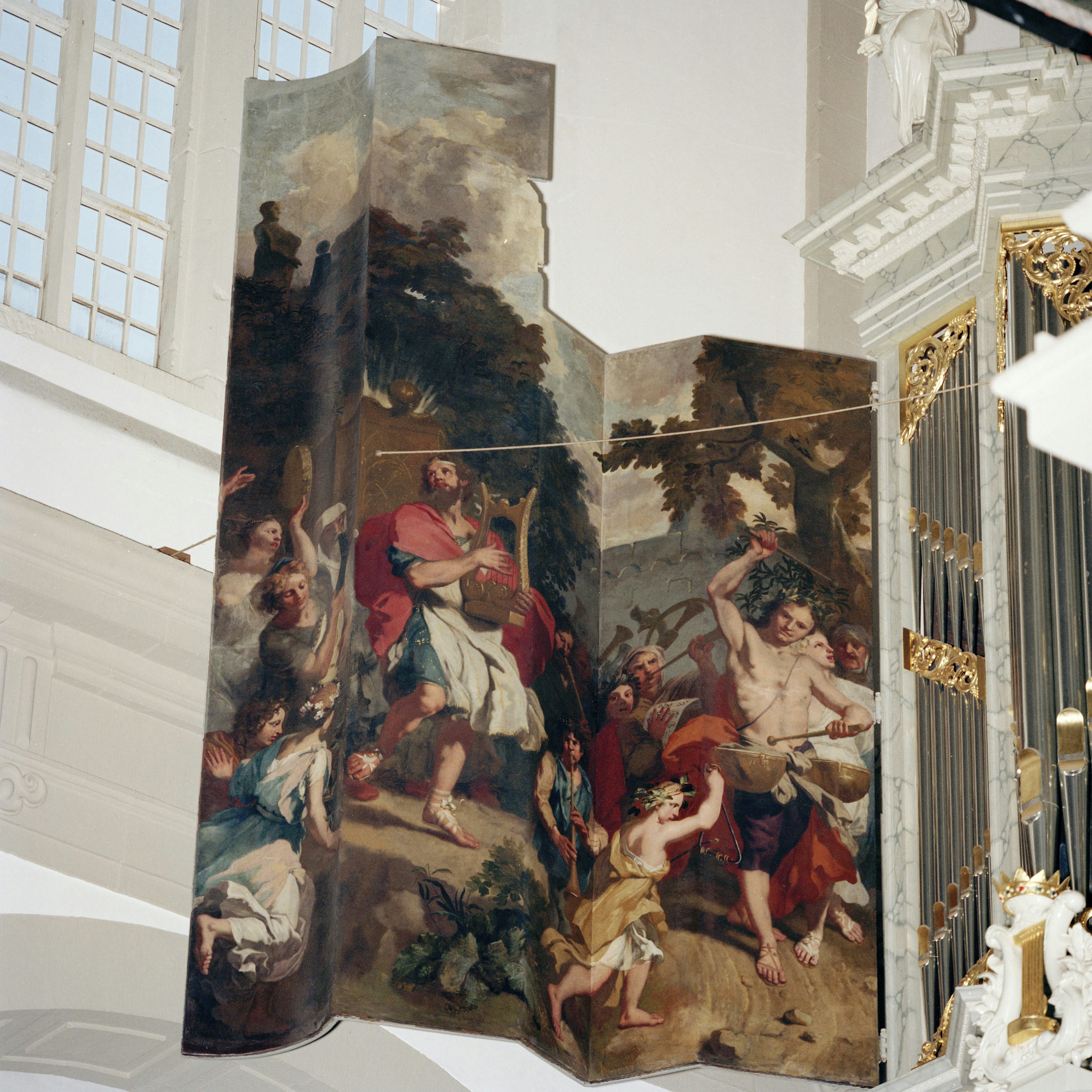 Westerkerk: Interieur, orgel, detail : binnenzijde van het linker hoofdwerkluik, 'Koning David danst voor de ark'. Vervaardiger: Gerard de Lairesse, 1686 (opmerking: Gemaakt voor het boek 'Orgelluiken' (Mieke M. van Zanten, 1999))